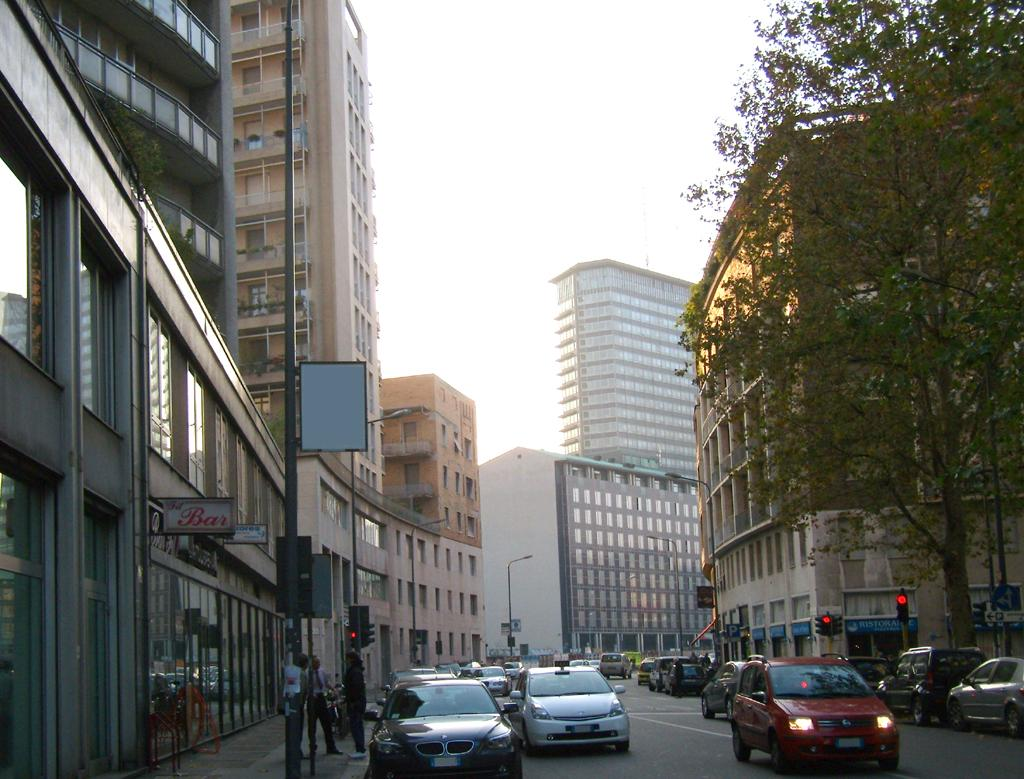 Via Pirelli, nel Centro Direzionale di Milano